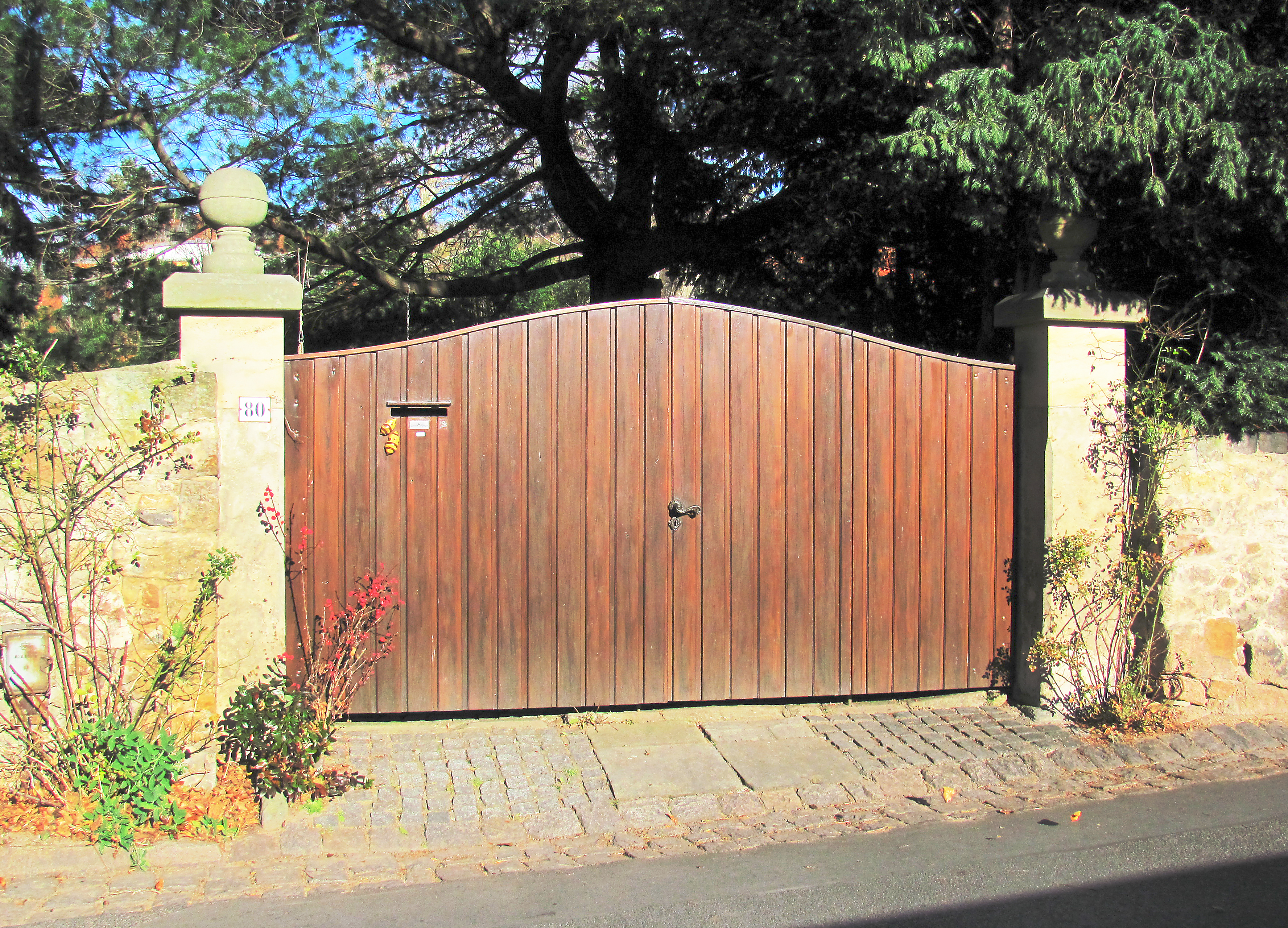 Radebeul, Haus Stephani, Tor